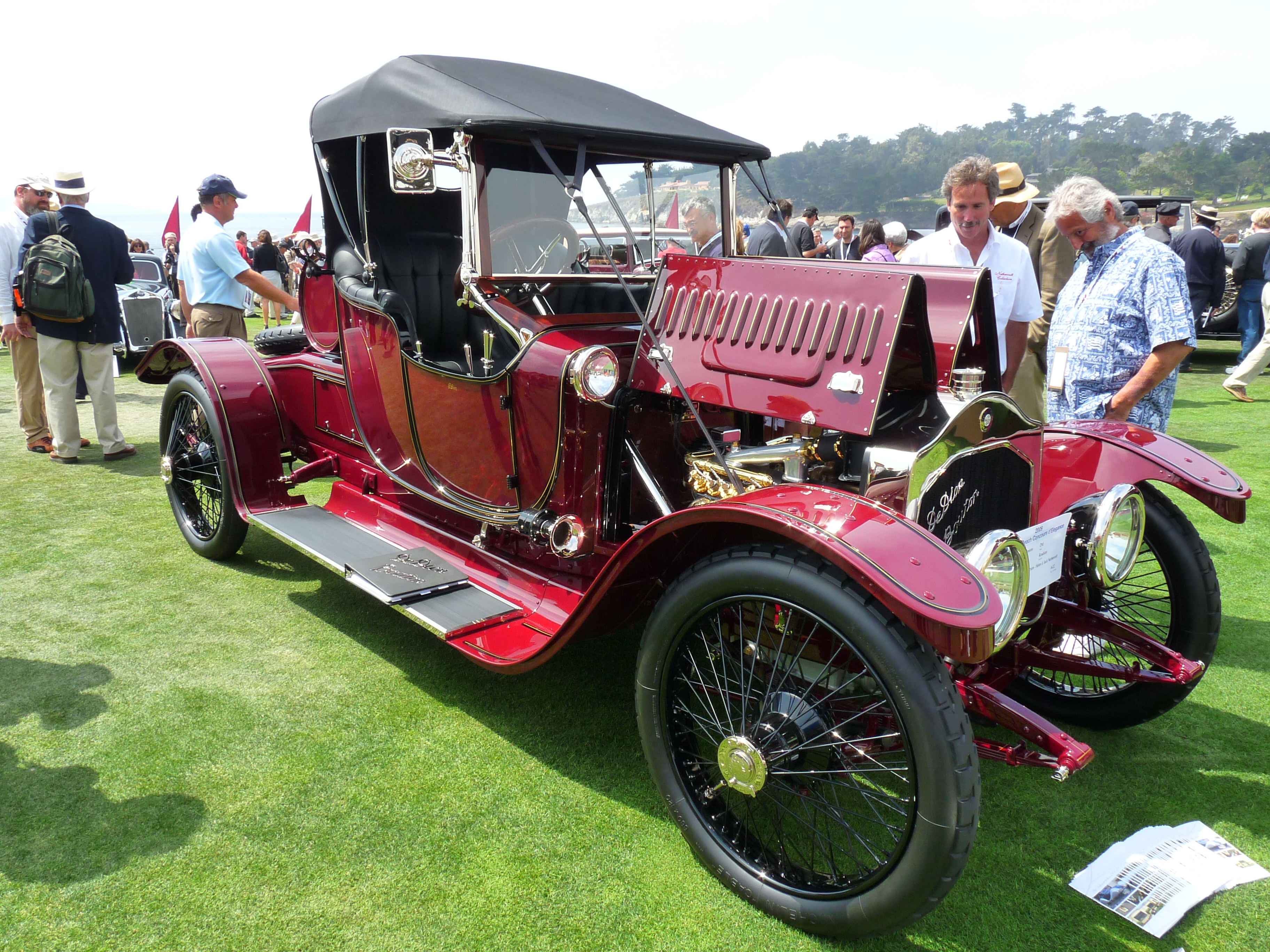 1912 De Dion Bouton DM A.S. Flandrau Roadster